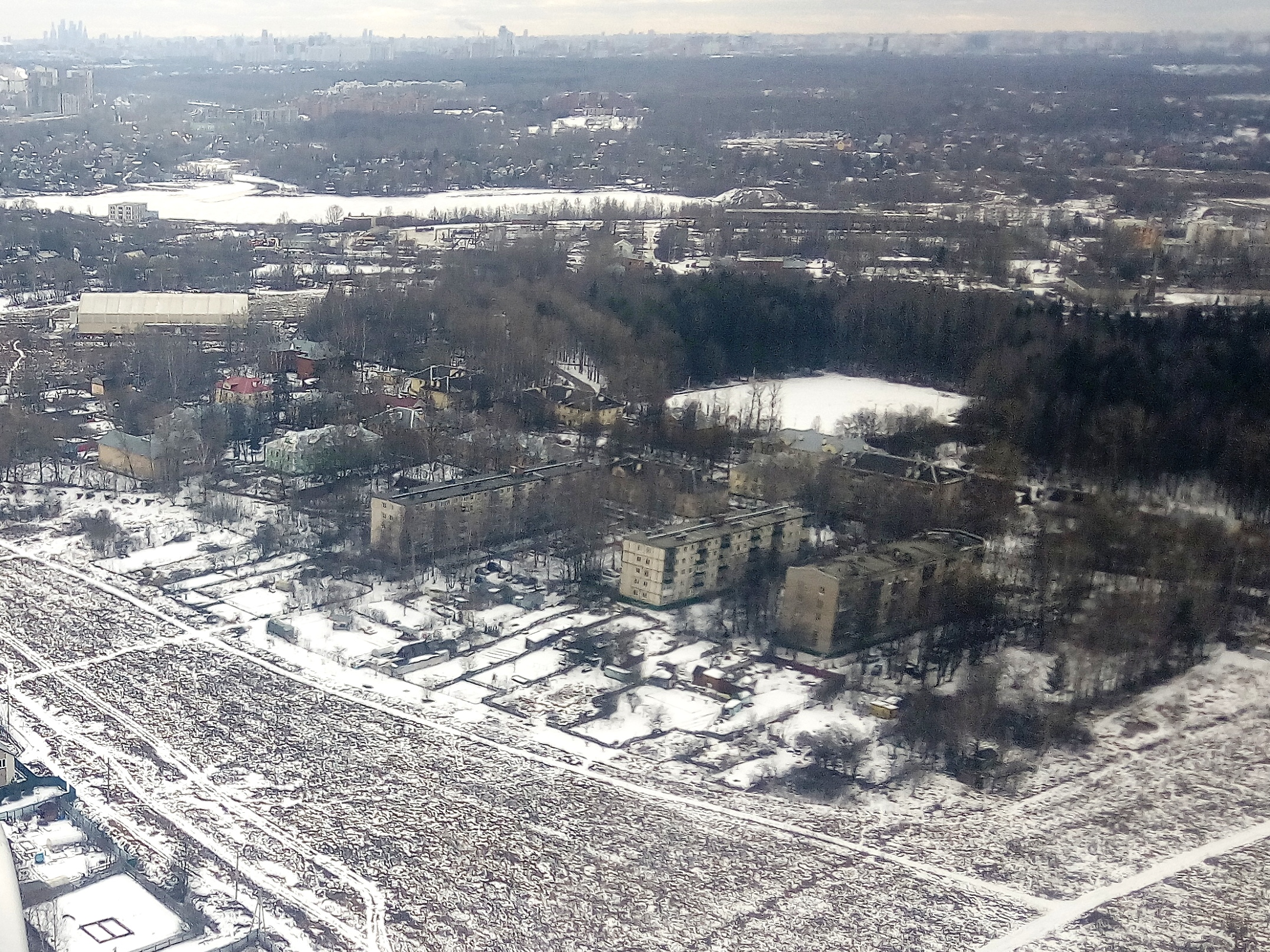 Посёлок нефтебазы Павельцево с воздуха